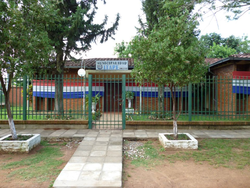 Municipalidad